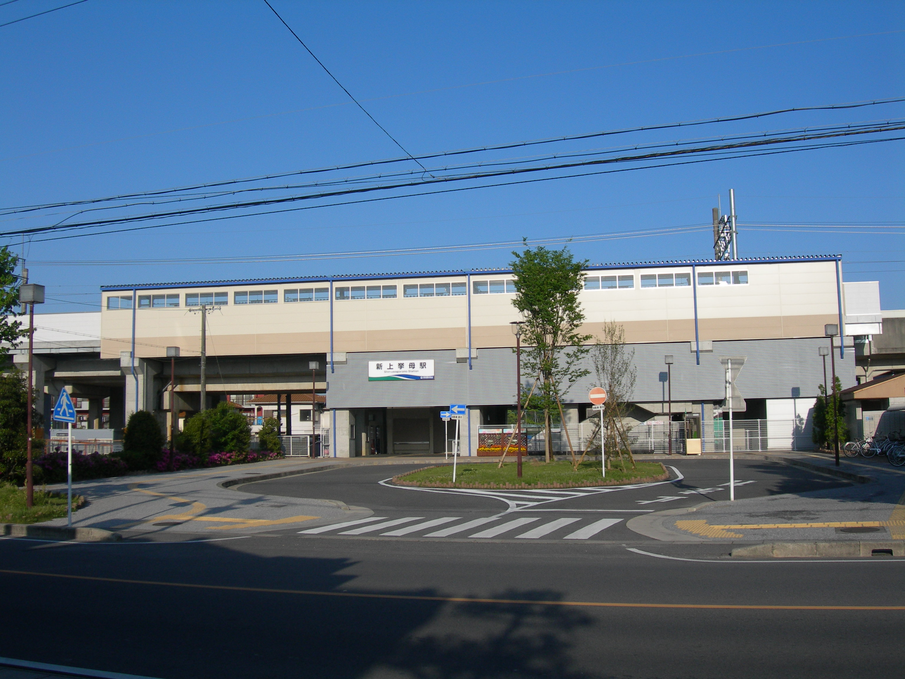 新上挙母駅